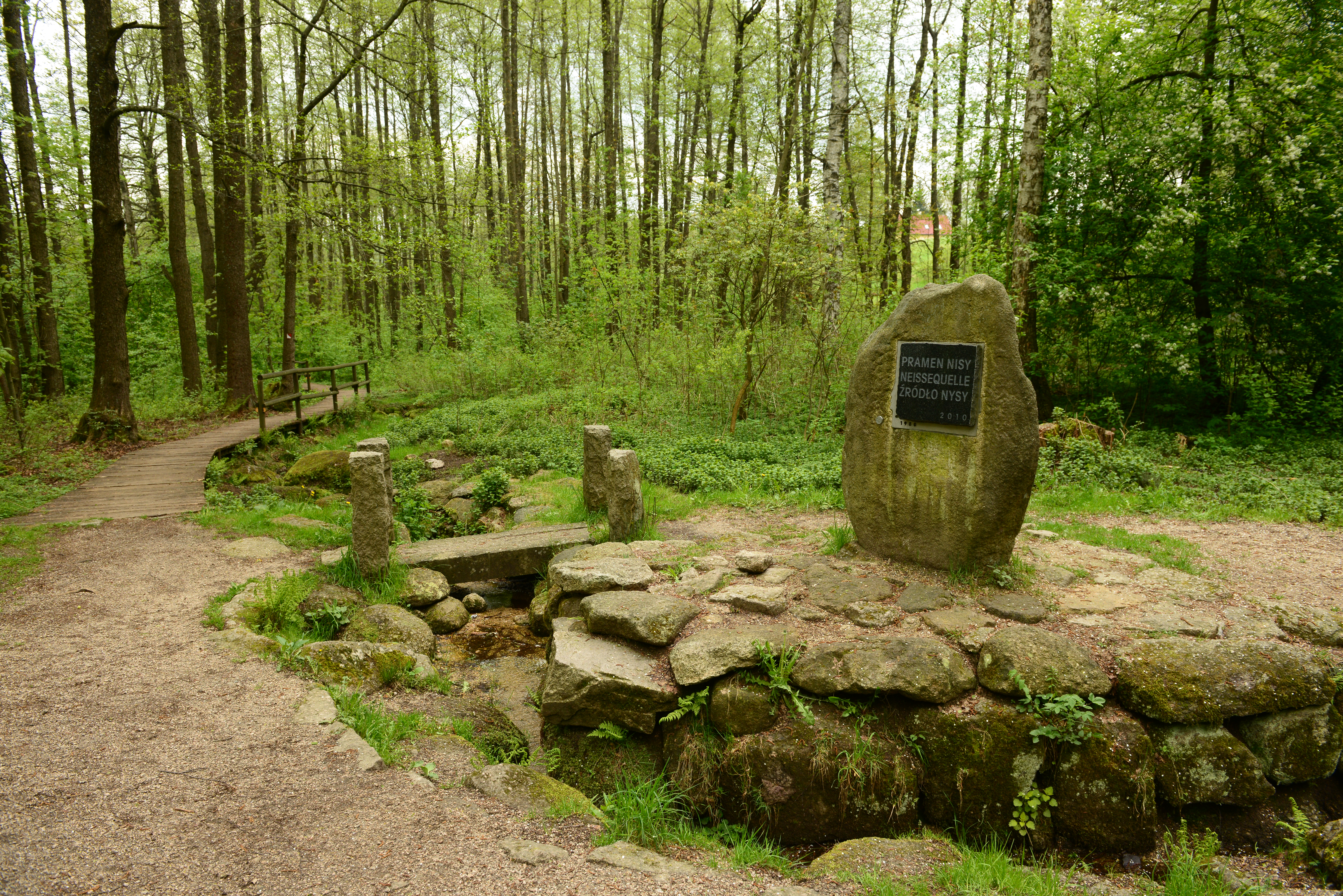 Pramen Lužická Nysa mezi Smržovze y Nová Ves nad Nisou